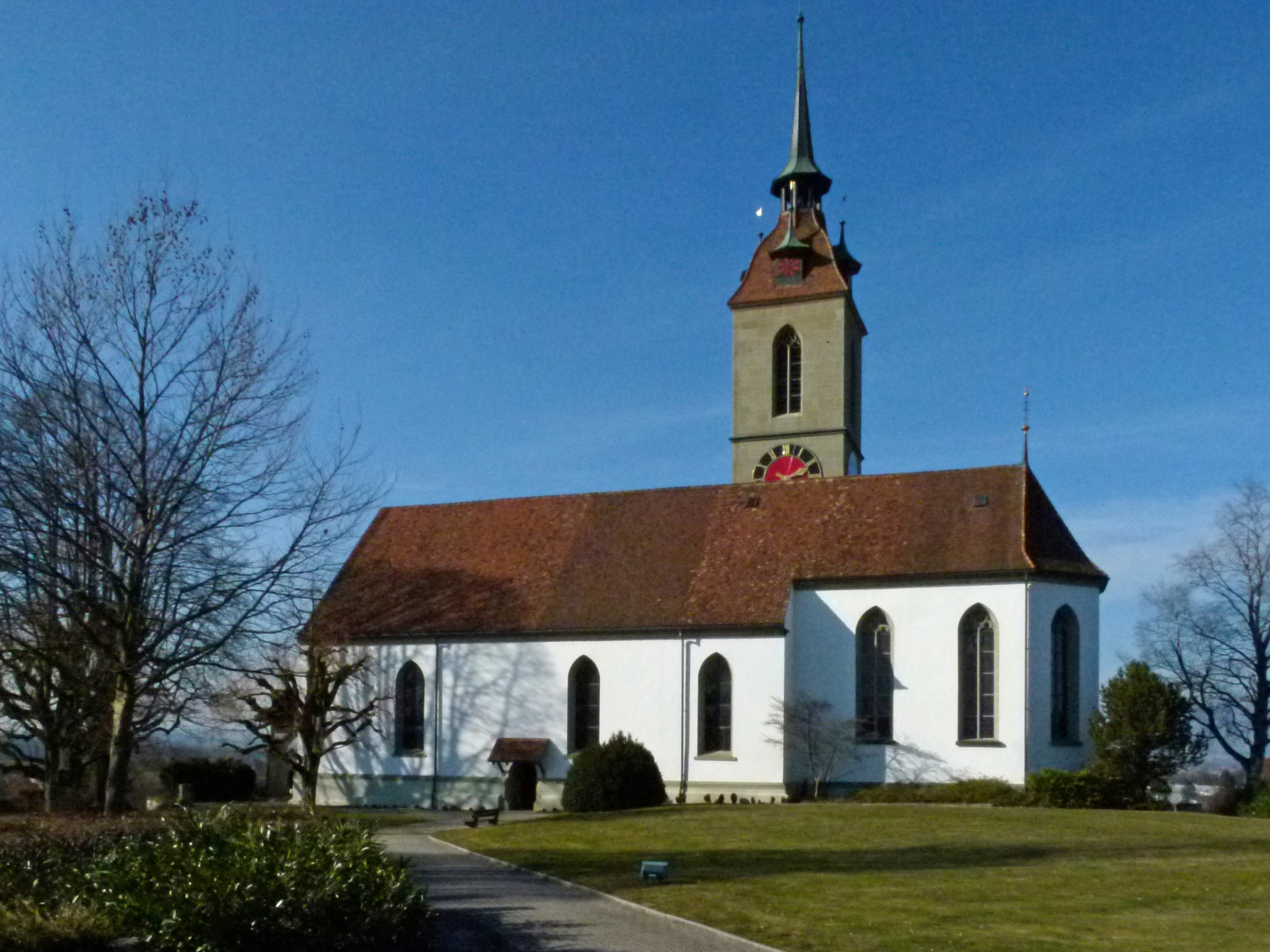 Reformierte Kirche von Kirchberg im Kanton Bern